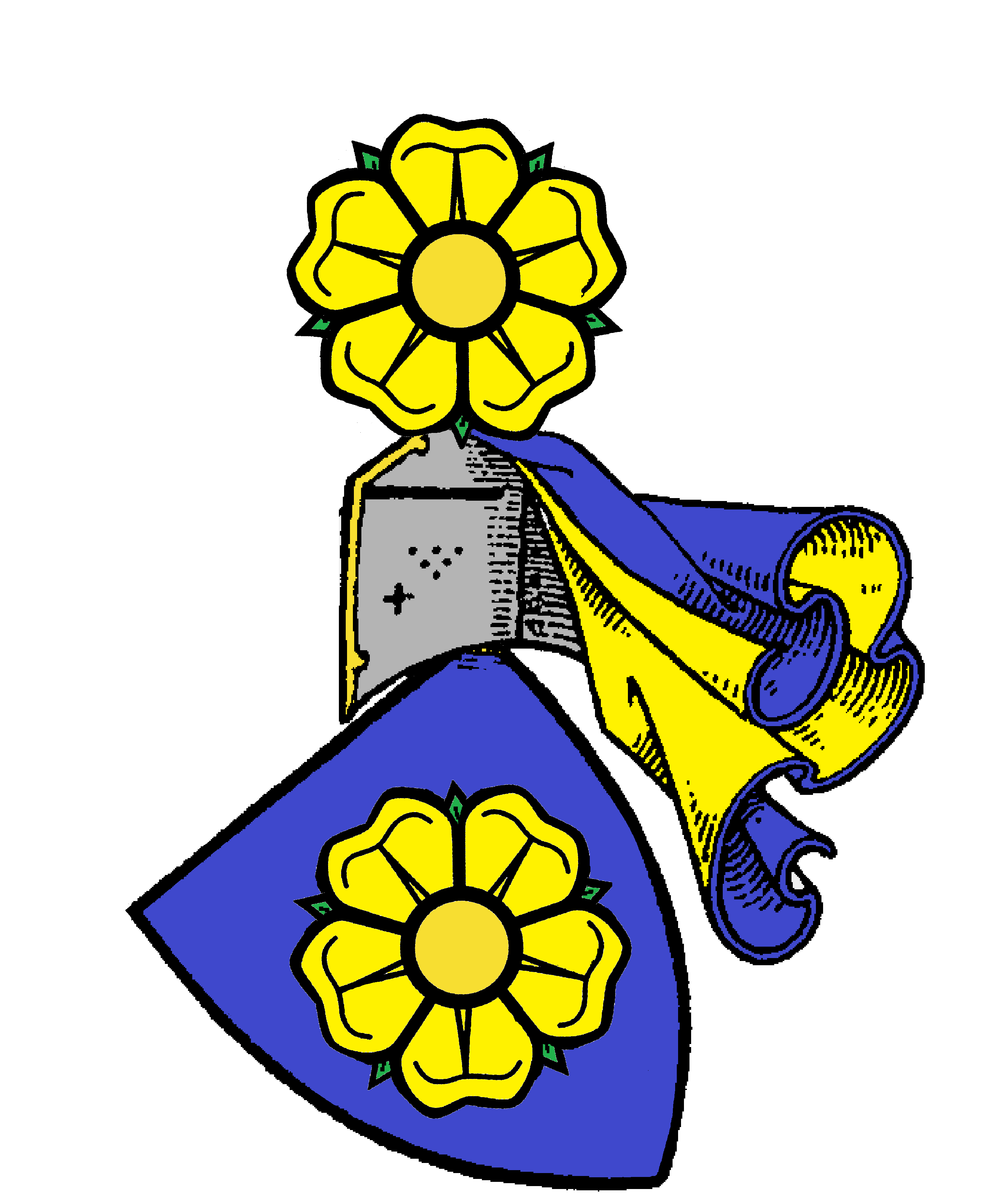 Původní znak pánů z Hradce